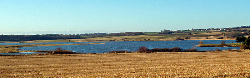 Norsminde Fjord set fra sydøst. Fjorden ligger ca. 20 km syd for Århus, Århus Amt, Jylland, Denmark